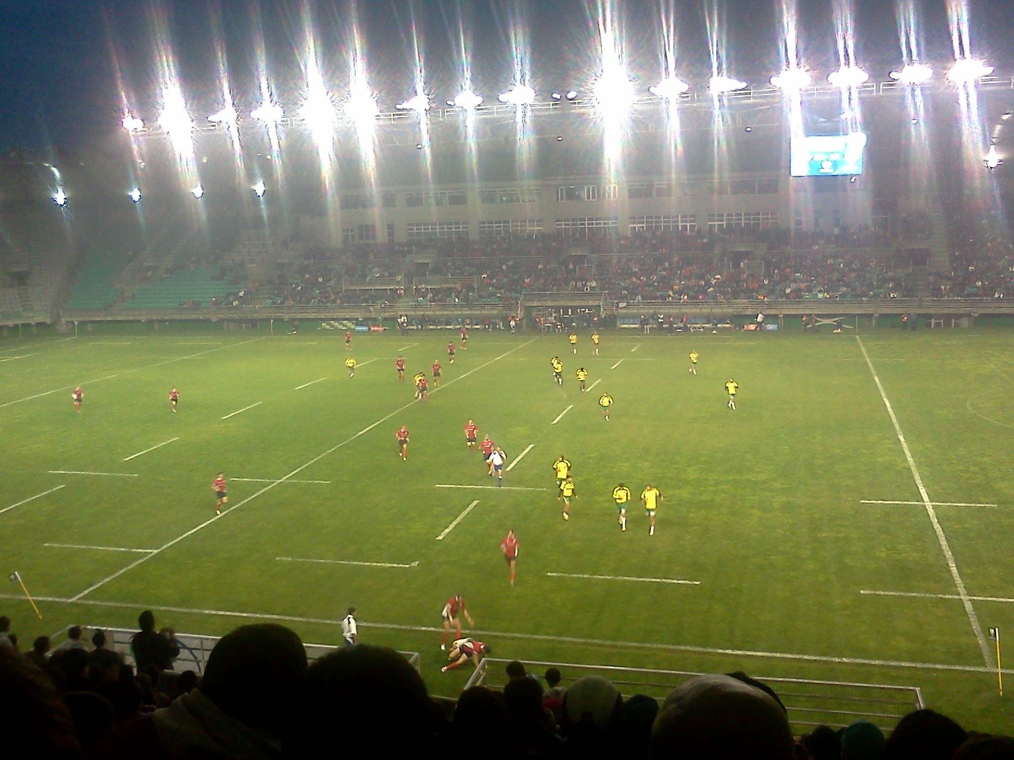 Chile enfrentando a Brasil por el Sudamericano clasificatorio al Mundial de Rugby Inglaterra 2015, en el Estadio Germán Becker de Temuco.